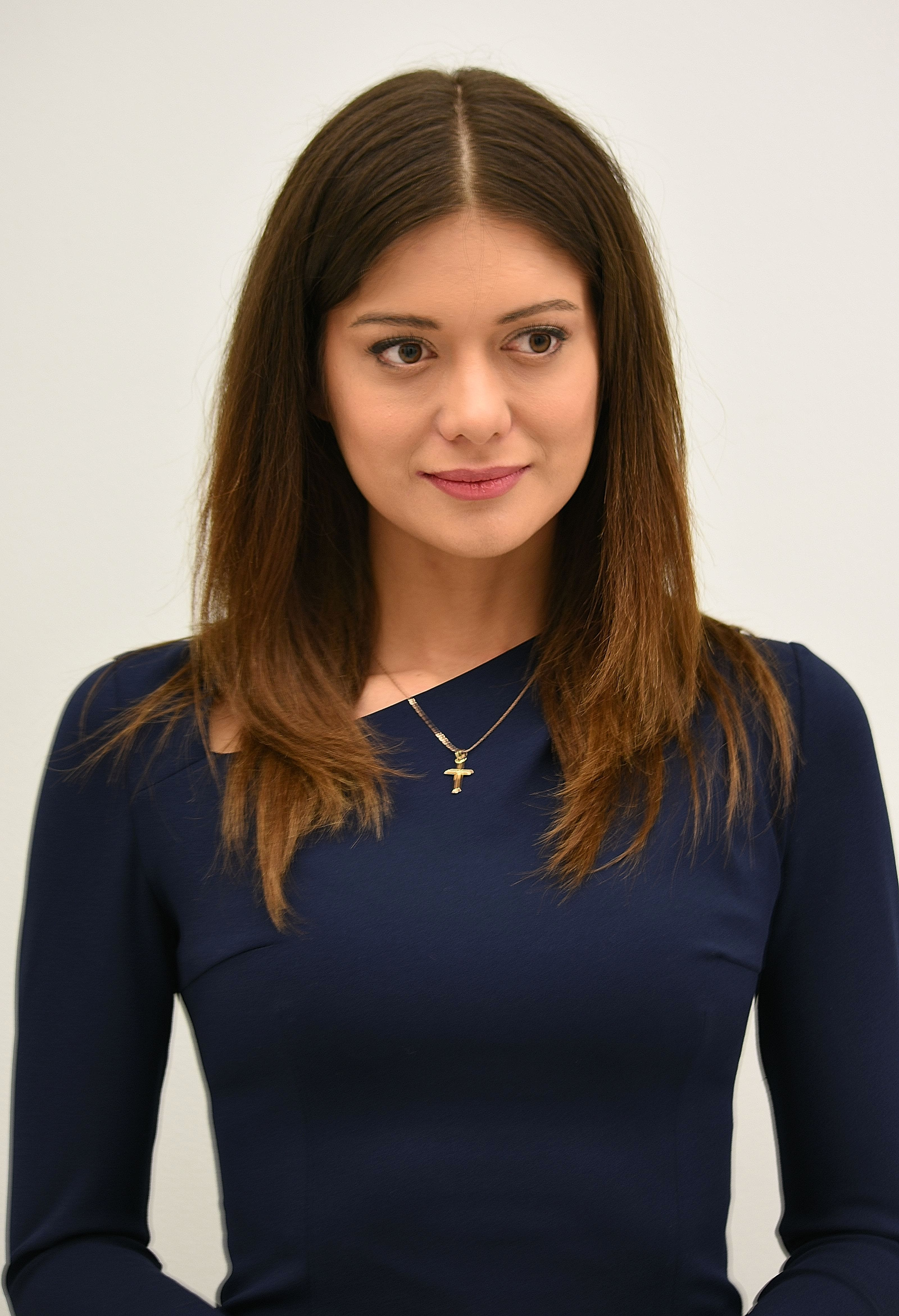 Miriam Shaded w Sejmie